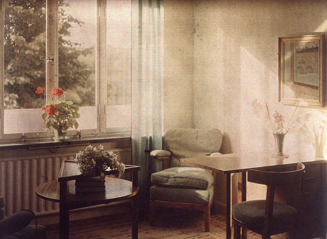 Stockholmsutställningen 1930, typlägenhet nr. 4 för HSB i paviljong 35